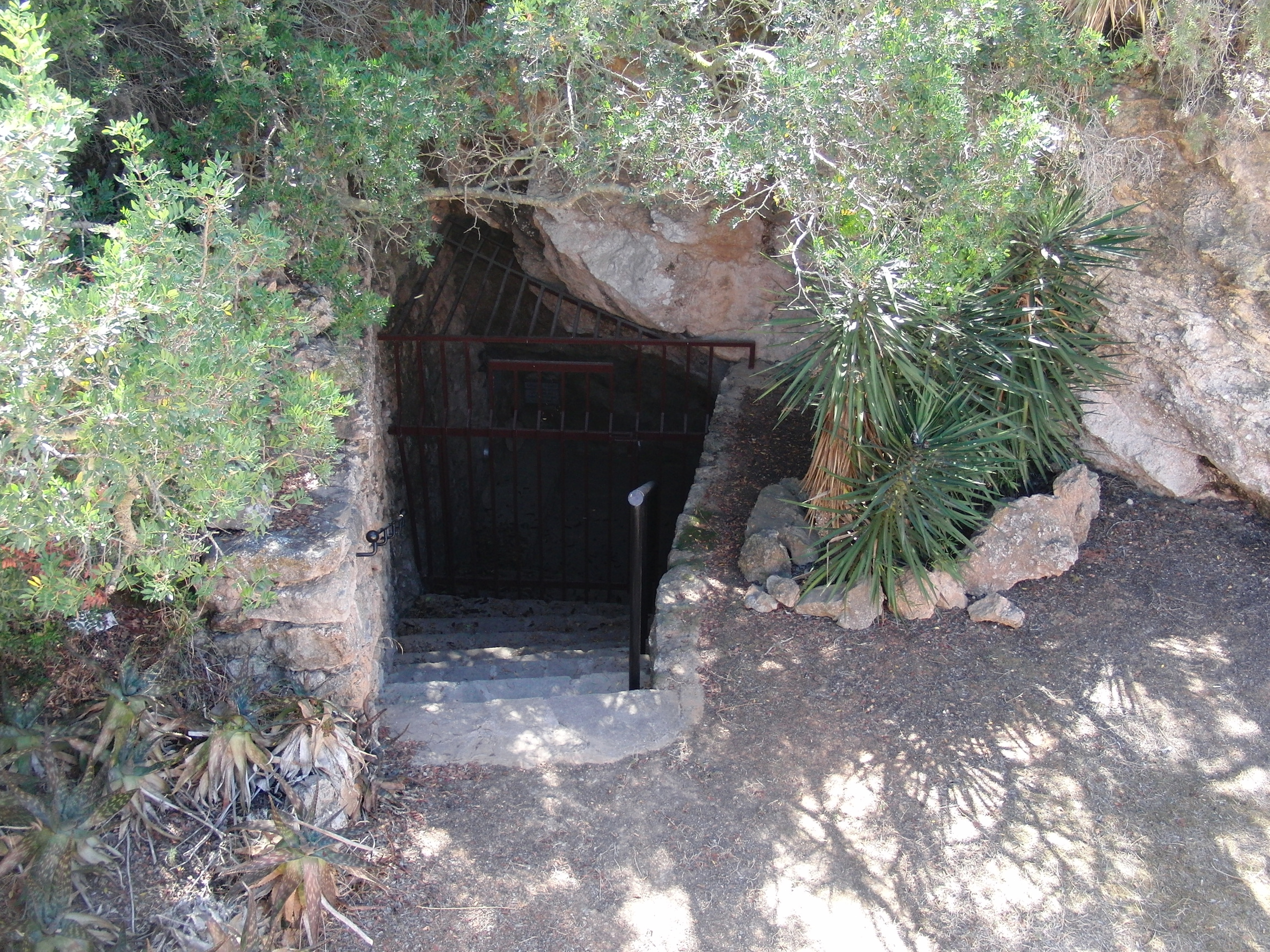 Eingang zur Cova de Santa Ines, Höhle mit frühchristlichem Altar bei San Antonio Abad (Sant Antoni de Portmany), Ibiza